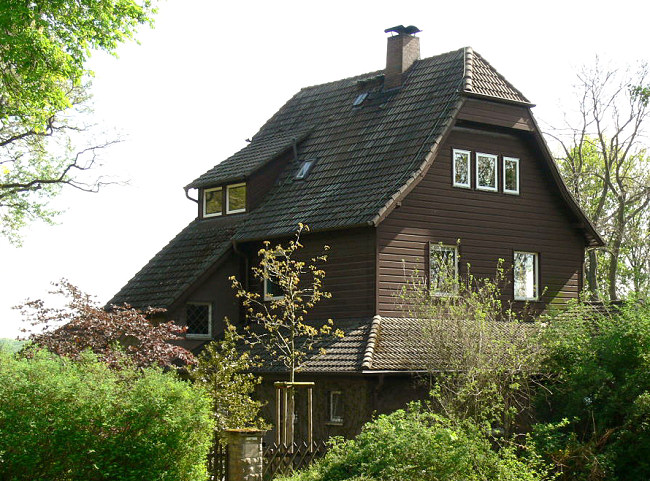 Elmwarte